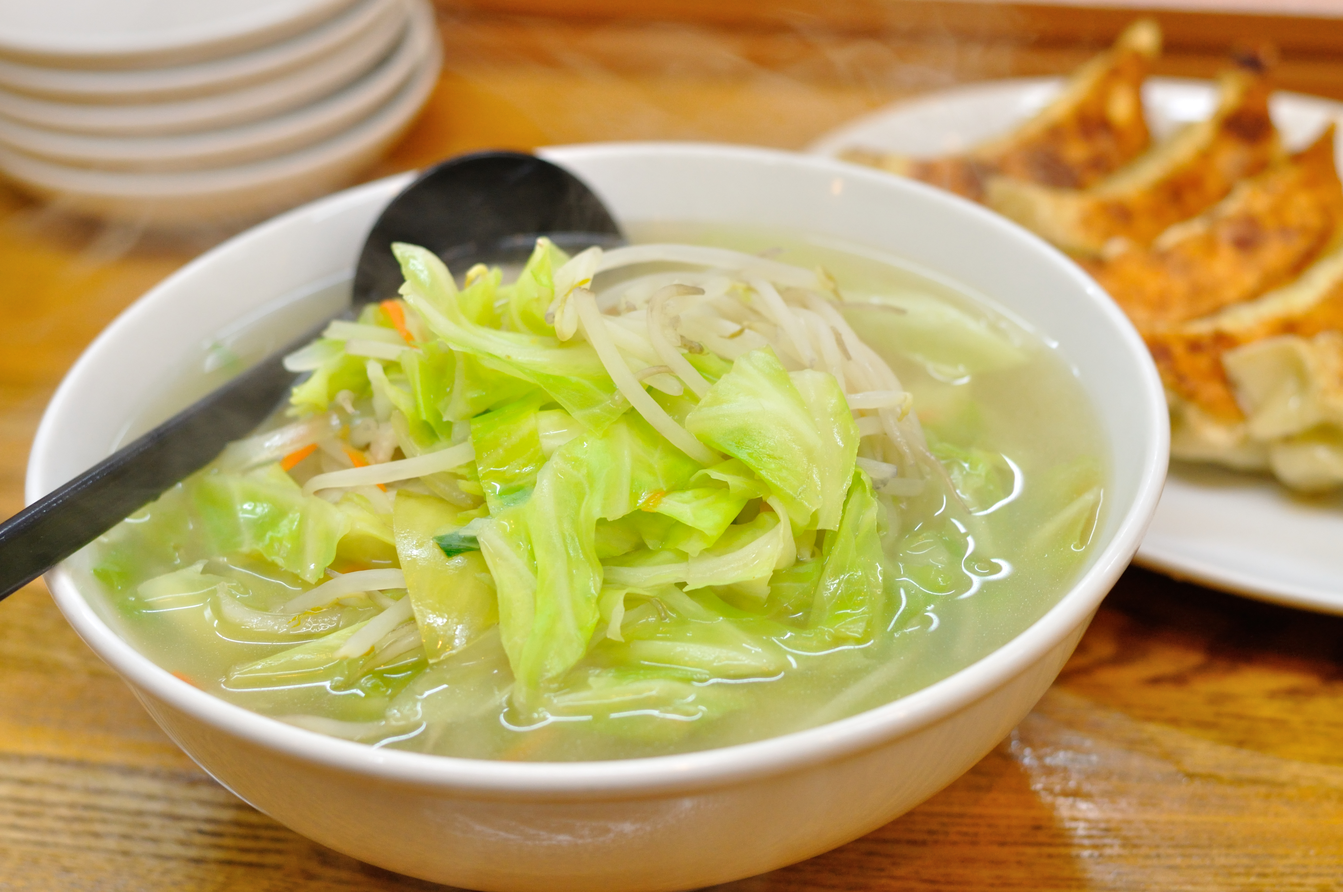 一般的なタンメンの例